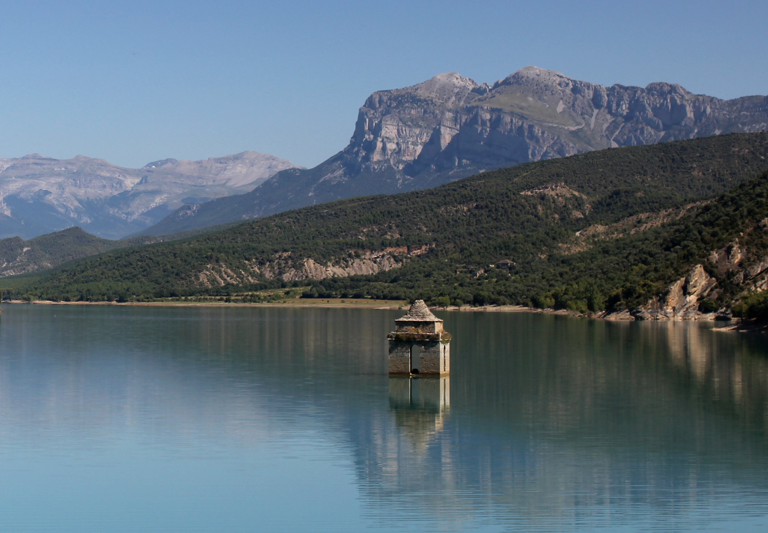 Aragonés: A punteta d'a torre de Mediano per alto de l'embalse quan ye pleno, en o verano de 2010.